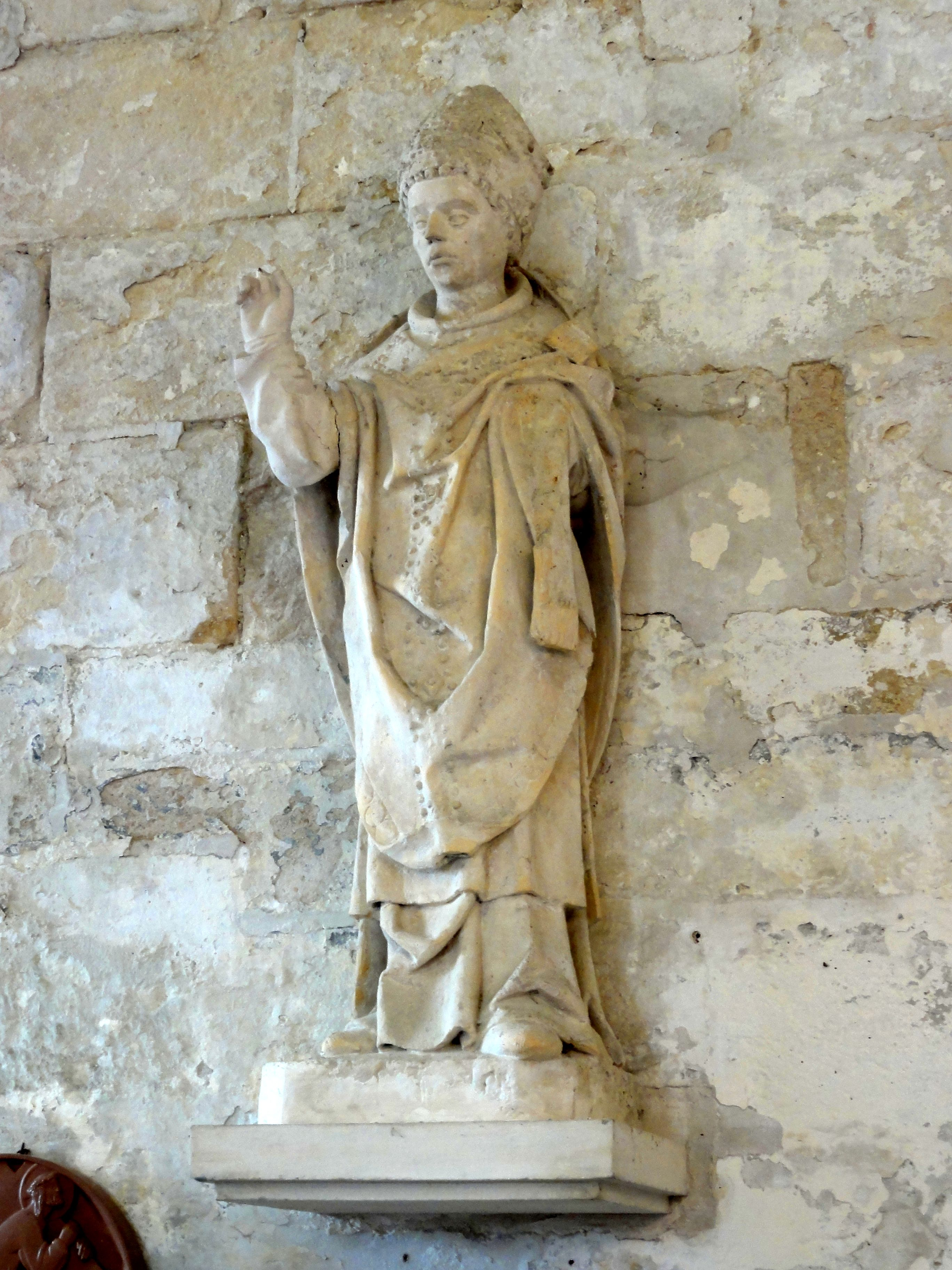 Statue d'un saint évêque dite Saint-Clair du Vexin.